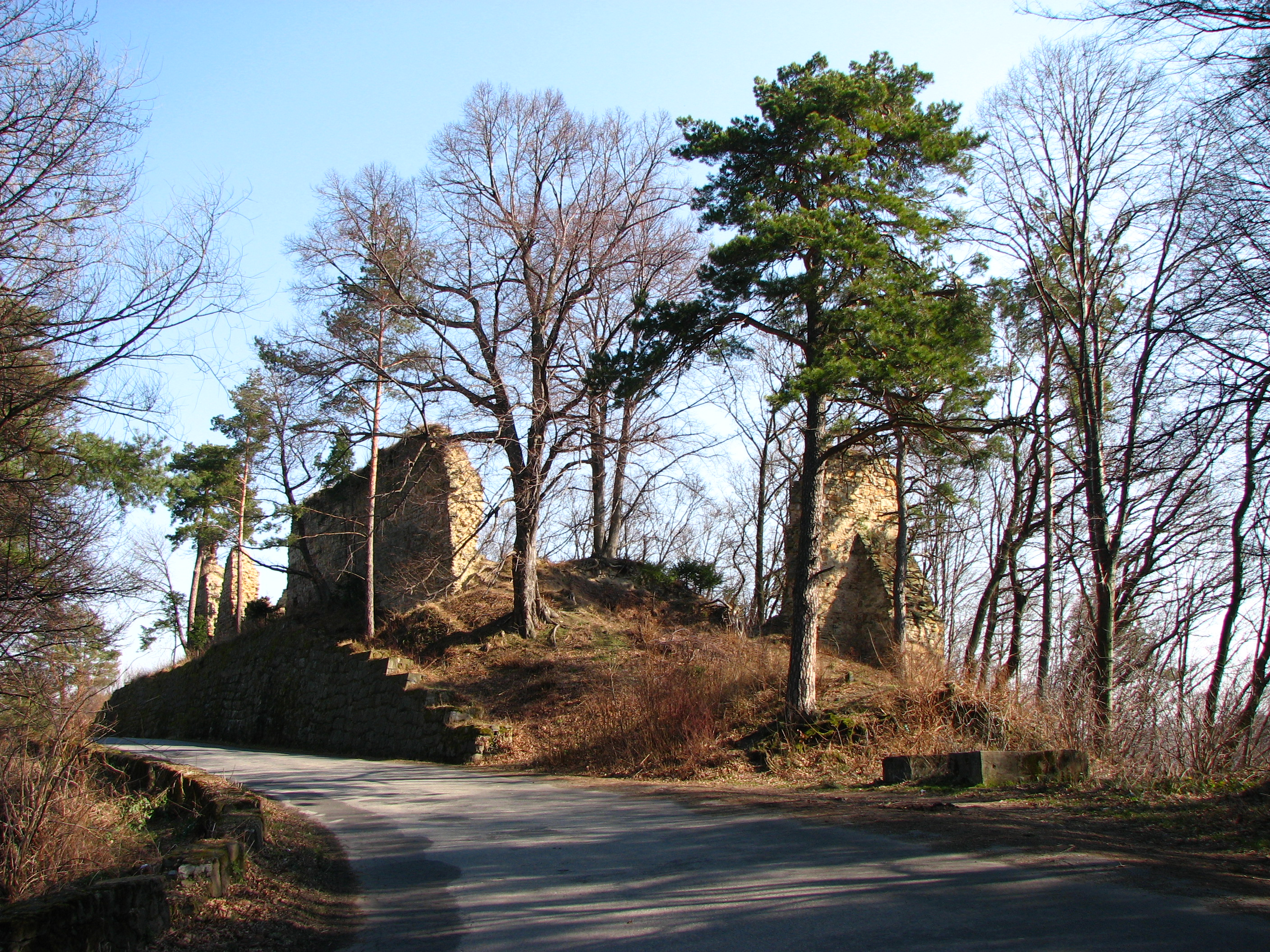 Rożnów, widok na ruiny zamku wybudowanego przez Piotra Rożena, należącego później do Zawiszy Czarnego z Garbowa, następnie rodu Tarnowskich